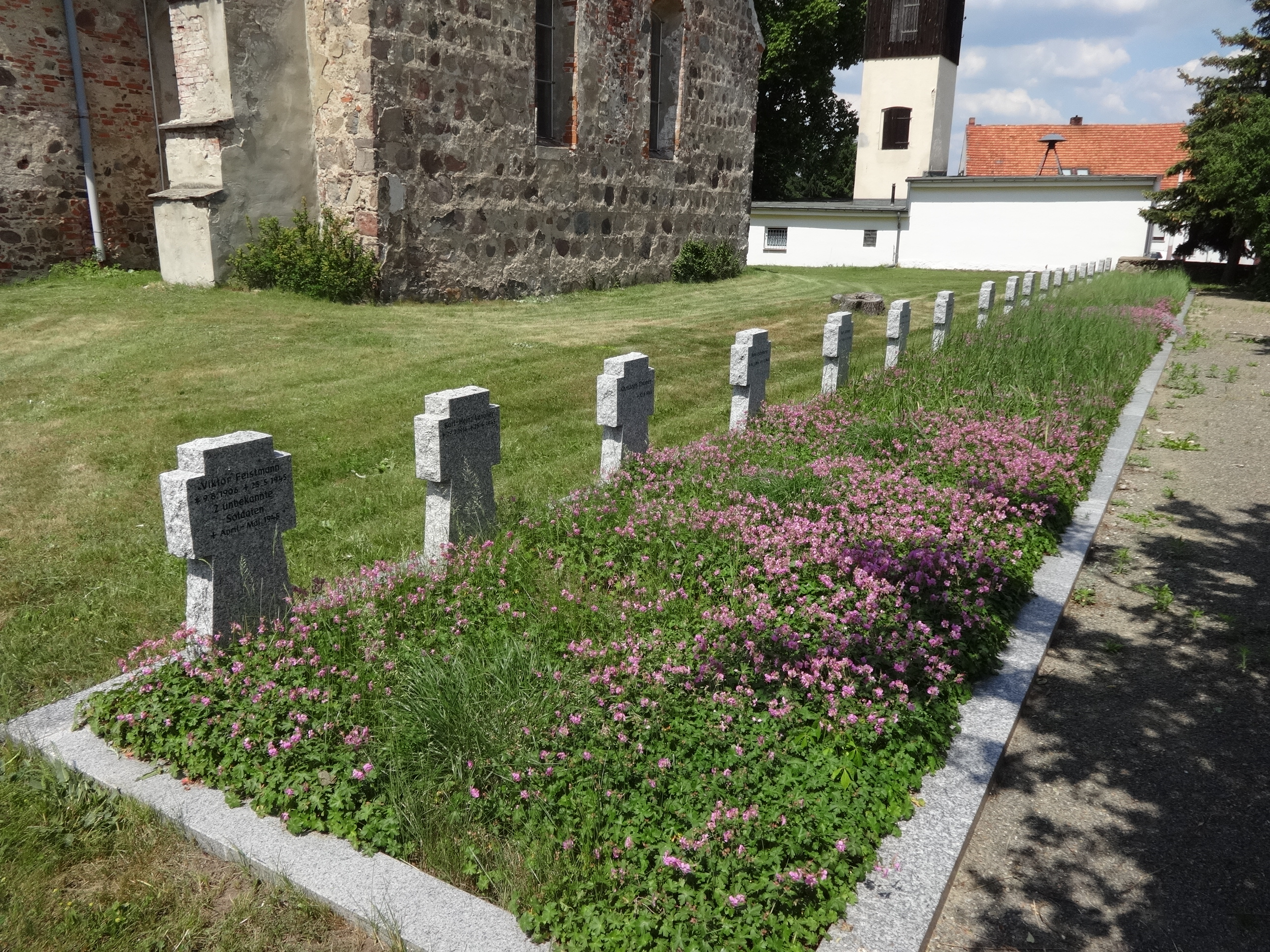 Die Dorfkirche in Paplitz entstand vermutlich im 13. oder 14. Jahrhundert als Feldsteinkirche. Sie wurde im Dreißigjährigen Krieg zerstört und wiederaufgebaut. Im Innern befinden sich ein Altaraufsatz, der in der Zeit um 1660 bis 1670 entstand und in seiner Predella das Abenmahlsbild und im Hauptfeld die Kreuzigungsszene Jesu Christi zeigt.